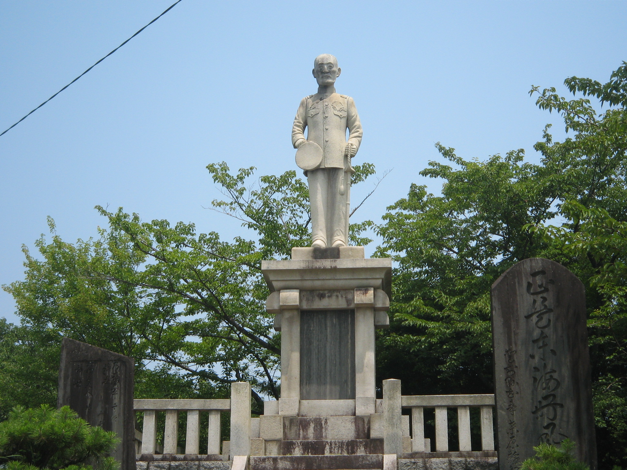 乃木大将像